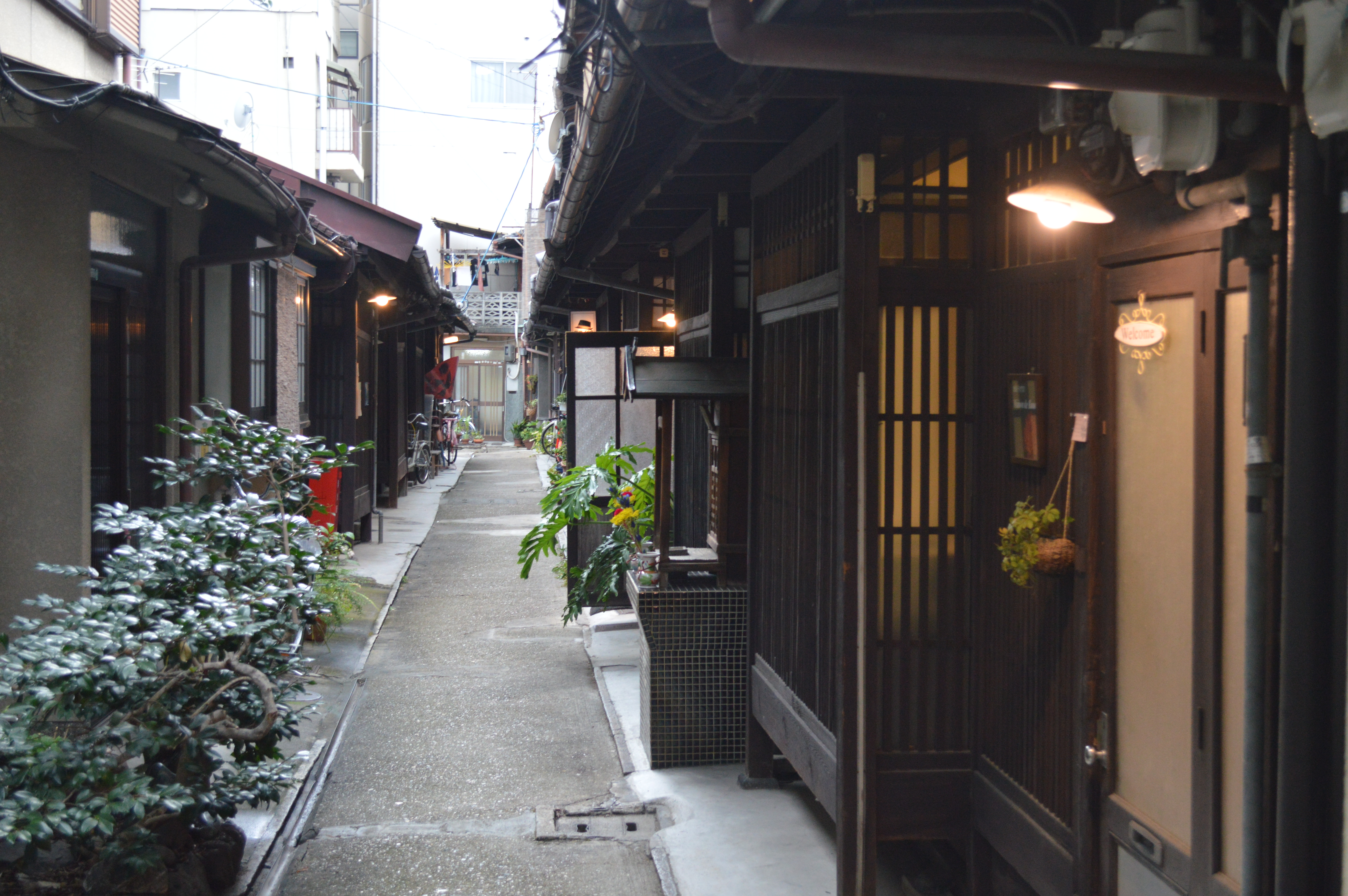 京都市にある「あじき路地」。長屋に若手芸術家が店を構えている。